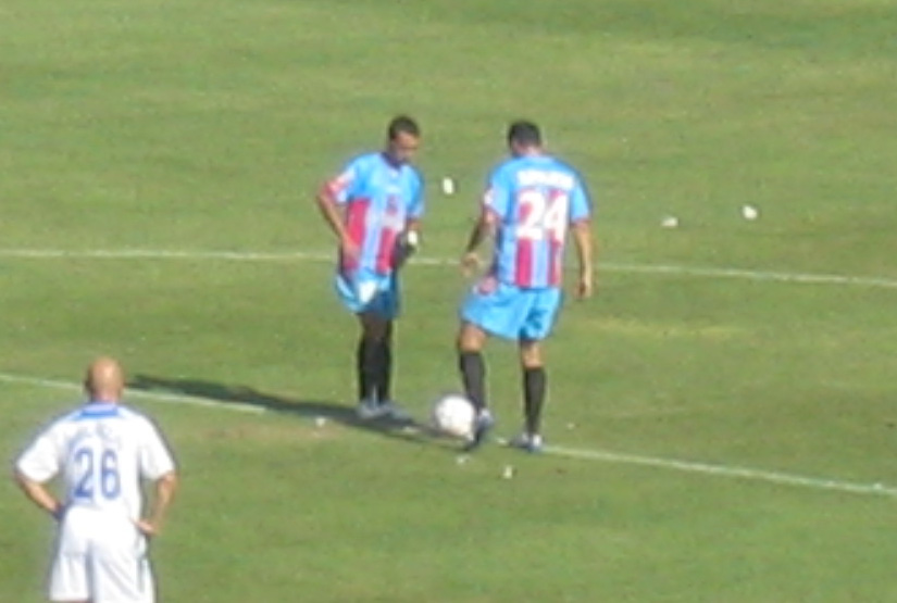 Giuseppe Mascara e Gionatha Spinesi sul pallone per il fischio d'inizio di Catania-Atalanta 0-0